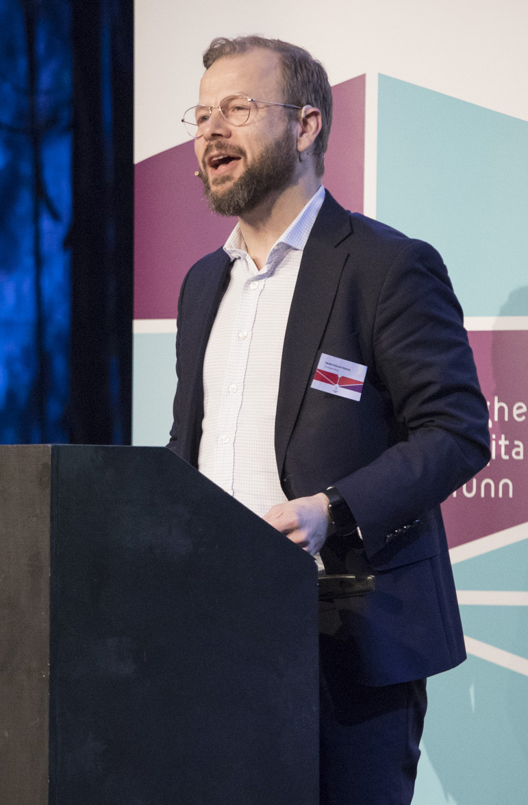 Heikki Holmås holder en tale på Frivillighet Norge sin Topplederkonfeanse i 2018